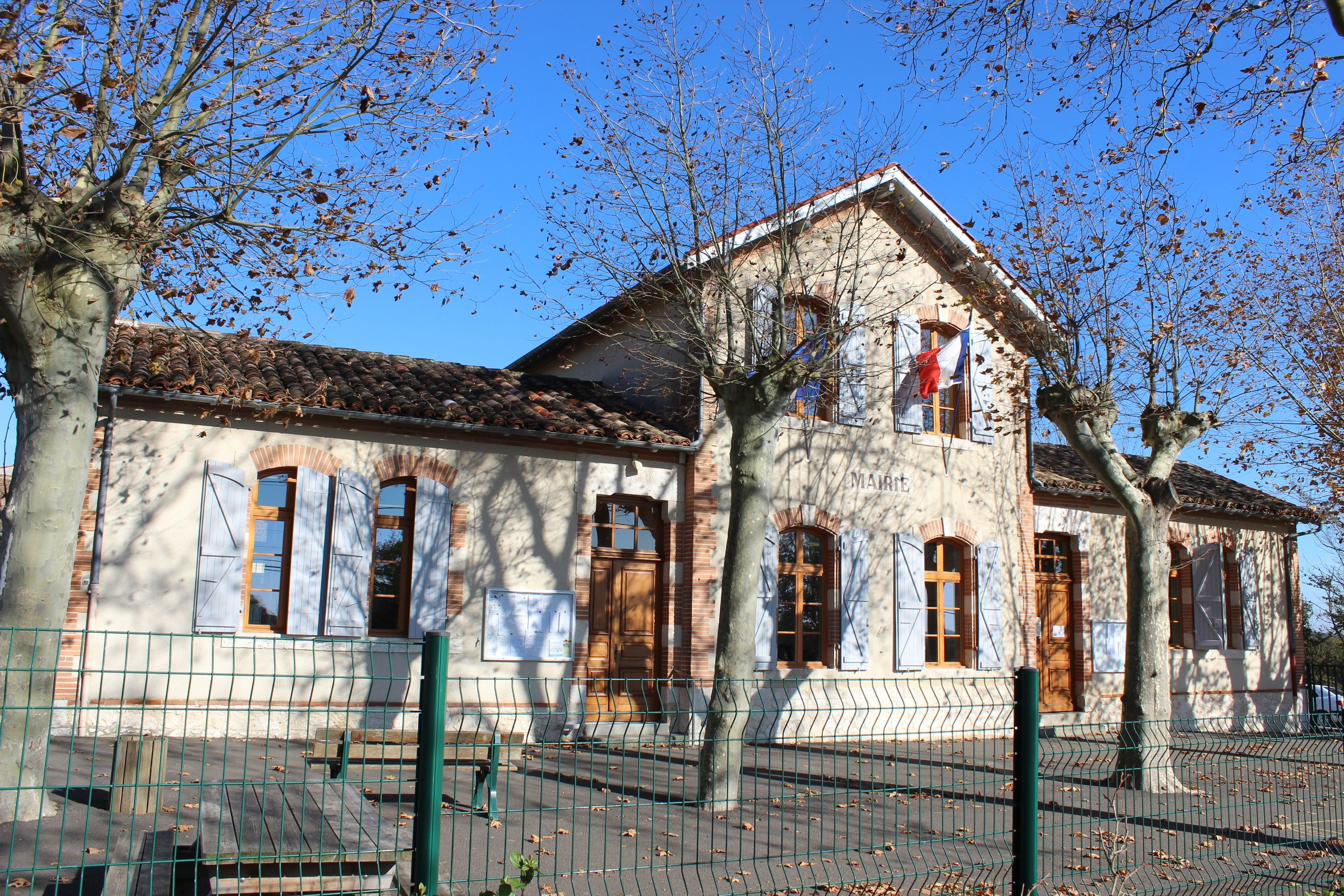 Public office